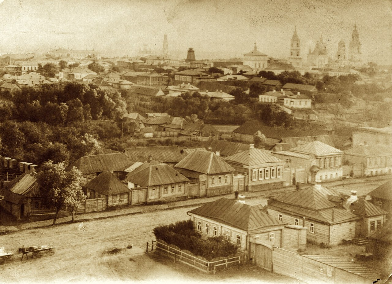 Центр г.Скопина Рязанской области по состоянию на начало 20 века (вид с колокольни Вознесенской церкви)